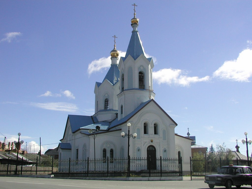 Храм Петра и Павла (Ямало-Ненецкий автономный округ, Салехард, улица Ного, 8)